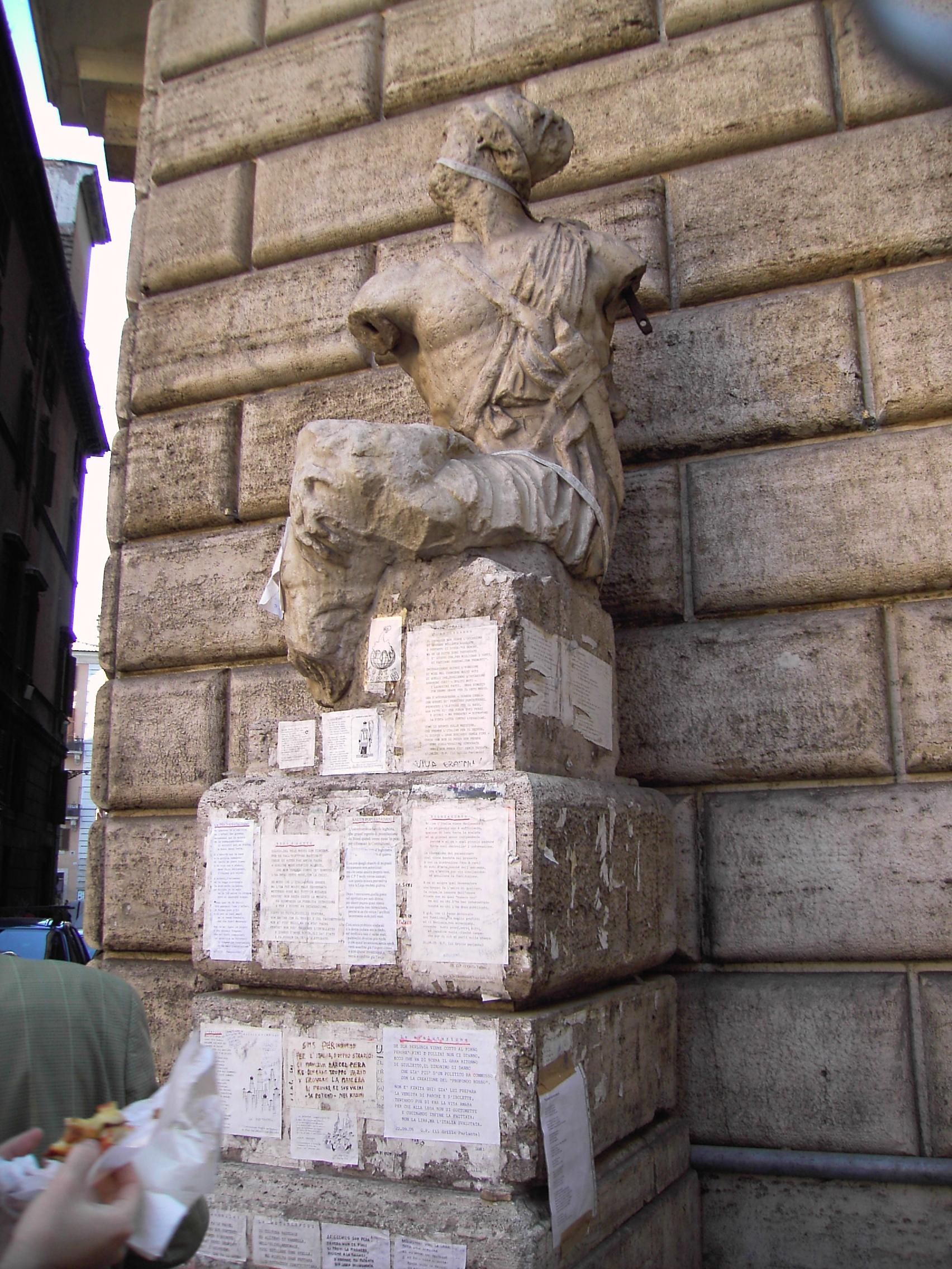 Roma, Pasquino (una delle statue parlanti) - a piazza Pasquino, dietro Piazza Navona